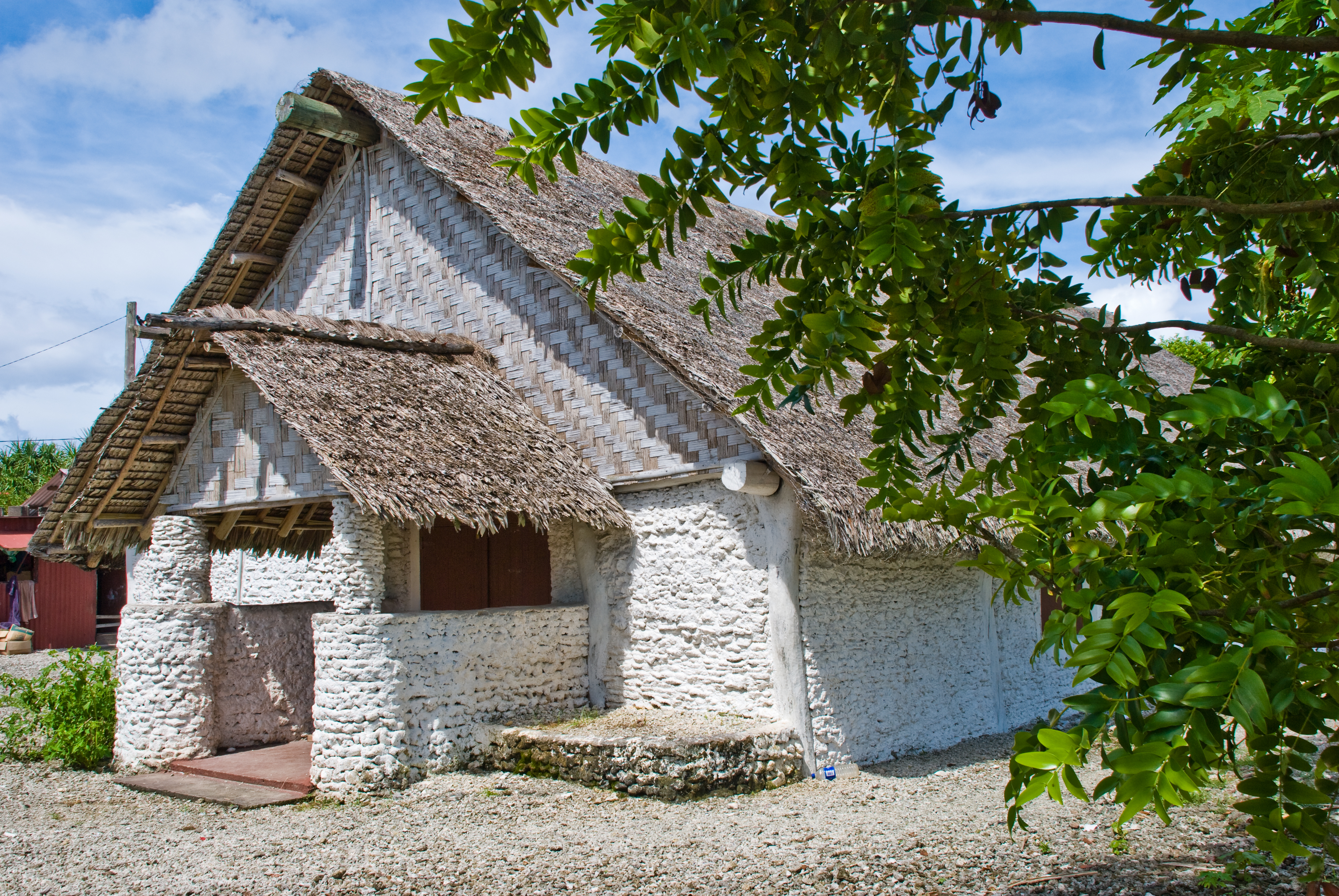 Pango village nakamal, Efate, Vanuatu, April 2008